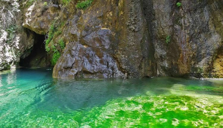 تنگ لیتون